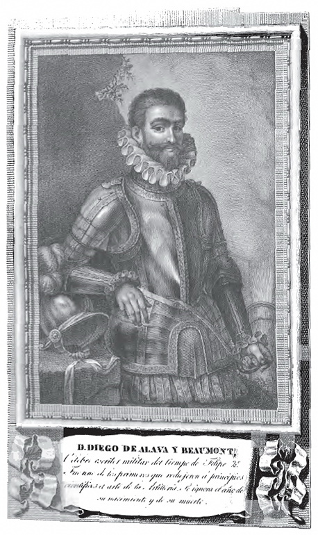 Retrato de Diego de Alava y Beaumont.